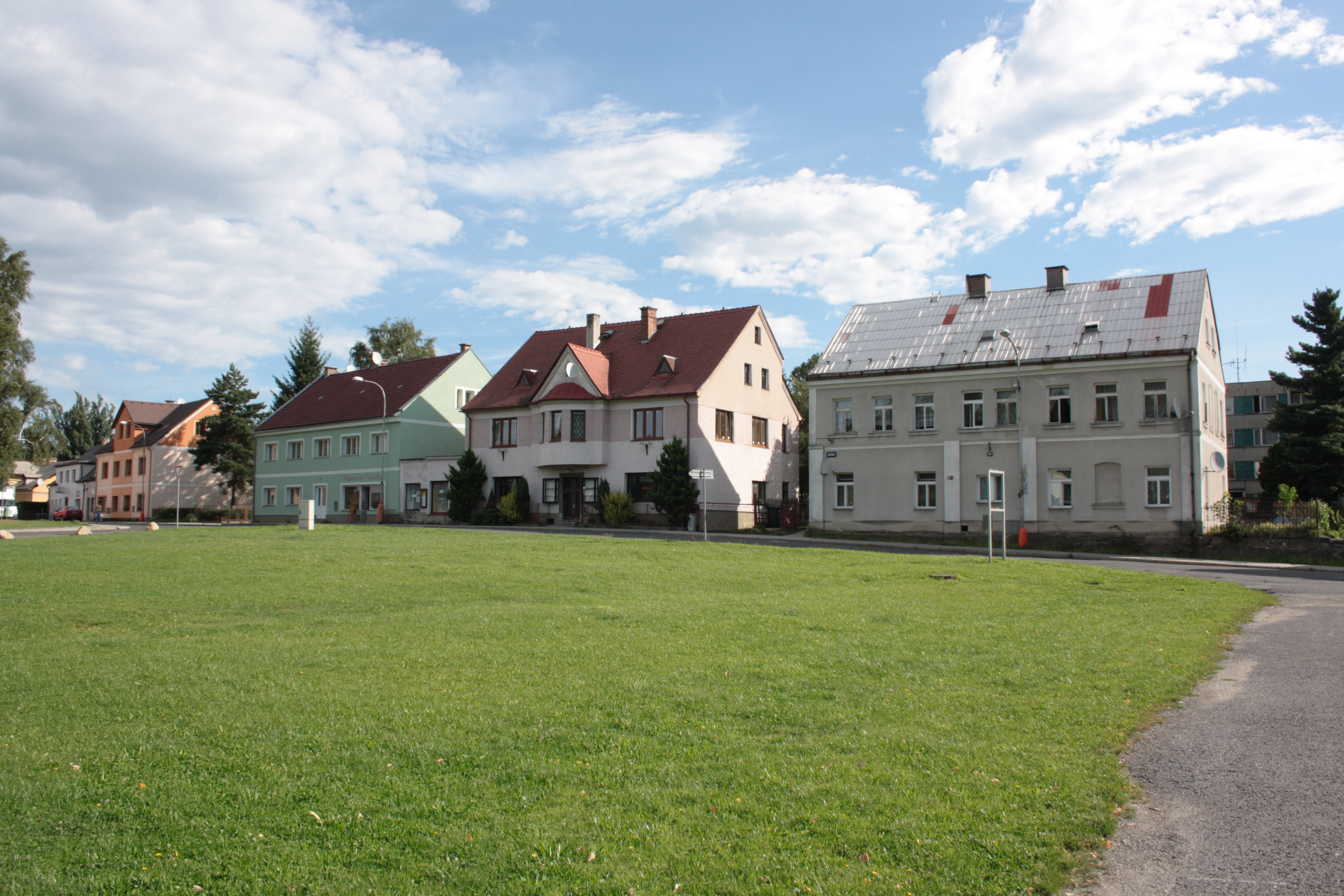 This photograph was taken with a DSLR from WMCZ's Camera grant. Zástavba v Jizerské ulici v Hejnicích v okrese Liberec.